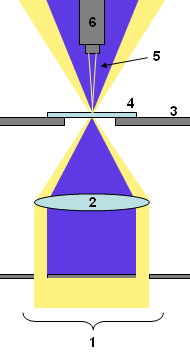 Schema 1 zu Dunkelfeldmikroskopie